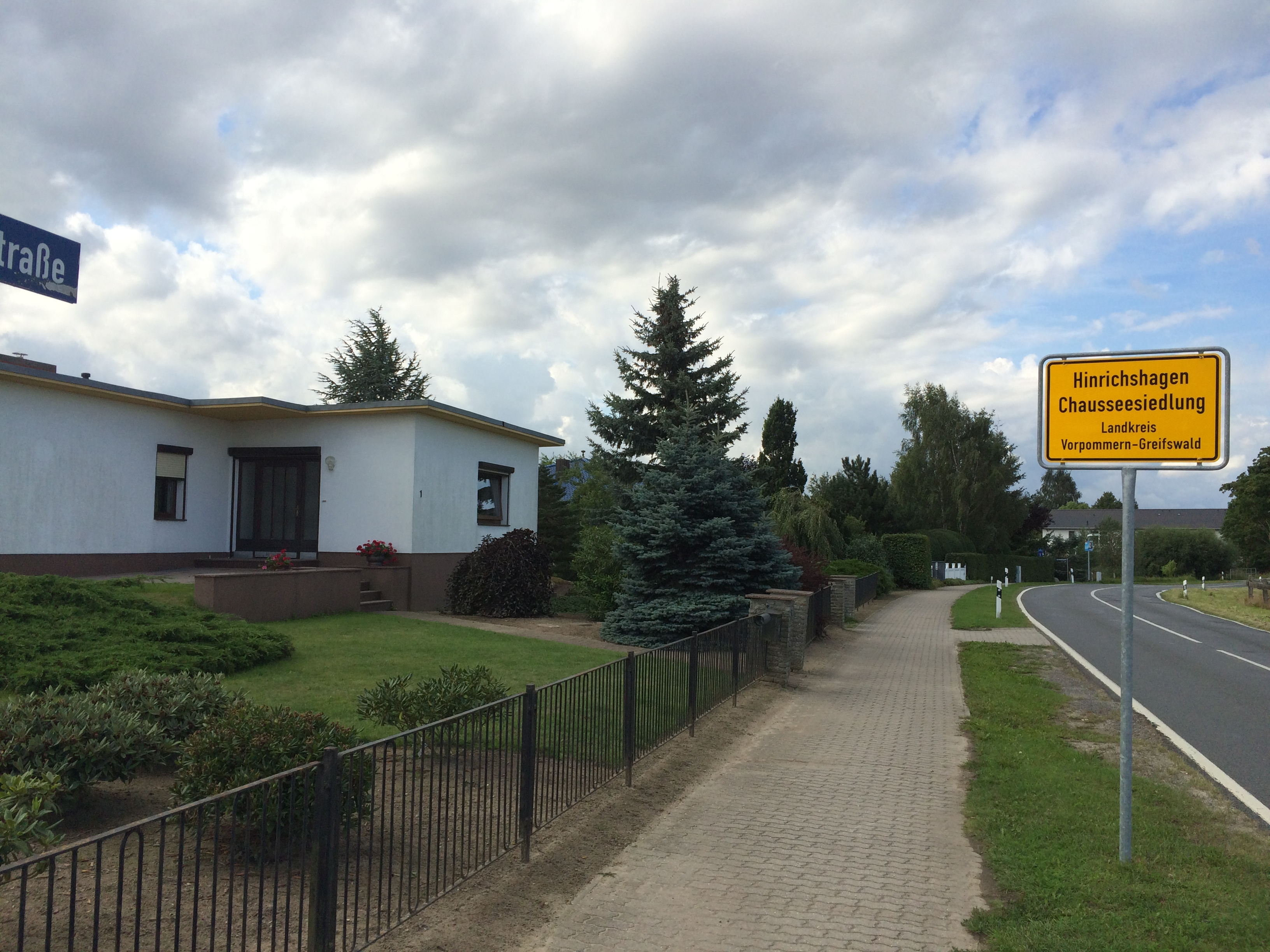 Chauseesiedlung in Hinrichshagen, einer Gemeinde im Landkreis Vorpommern-Greifswald, Mecklenburg-Vorpommern